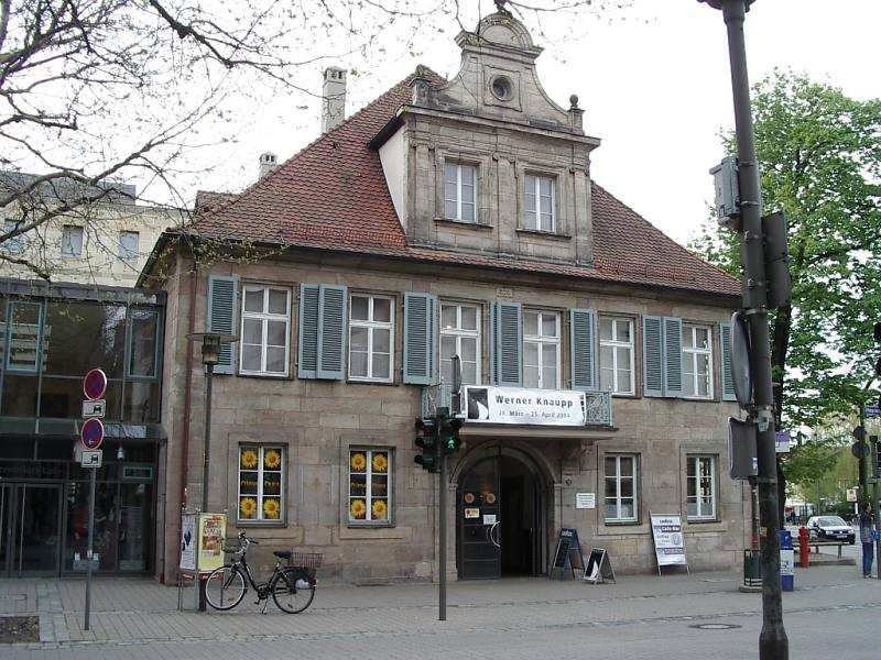 Erlangen, Wohnhaus, von NO (2004-04-25). - Johann Gottlieb Fichte wohnte hier 1805.